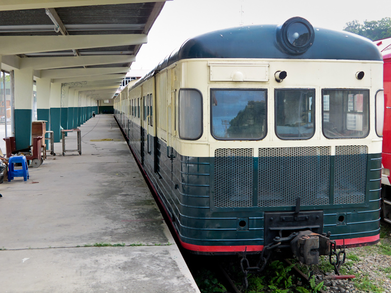 Gleis 1, reserviert für die historische North Borneo Railway